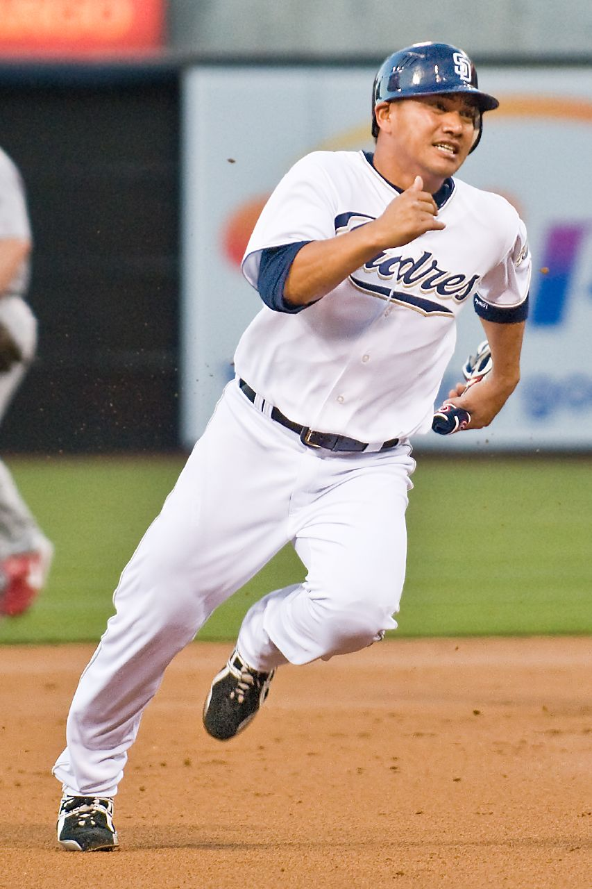 Tadahito Iguchi